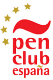 Logo del PEN Club España